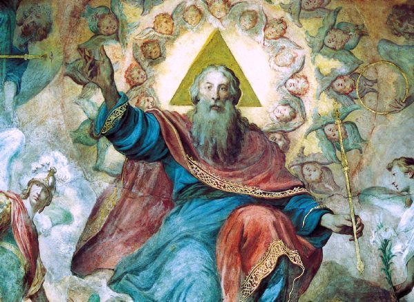 Eterno Padre partecipe alla Resurrezzione del CristoShqip: Ati Perëndi pjesëmarrës i Ngjalljes së Krishtit